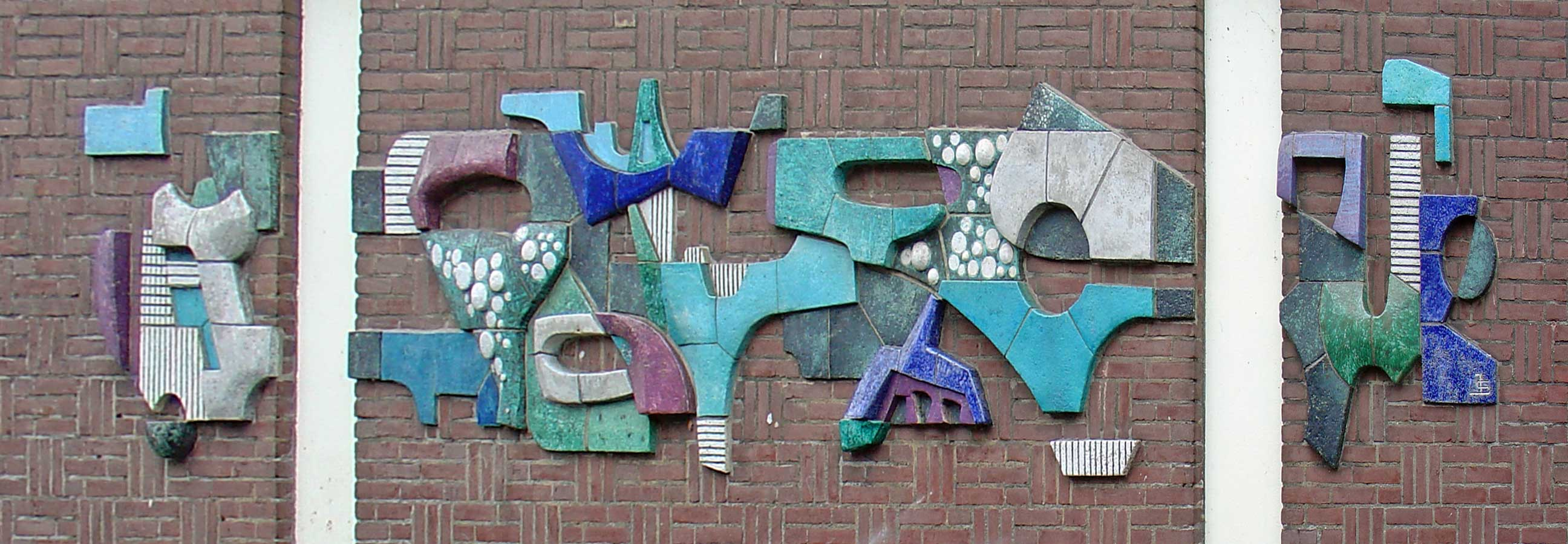 Zonder titel (keramiek, reliëf, 1963) door Josje Smit - Krugerlaan Gouda